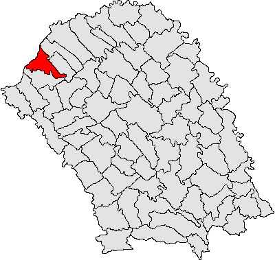 Categorie:Hărţi ale judeţului Botoşani